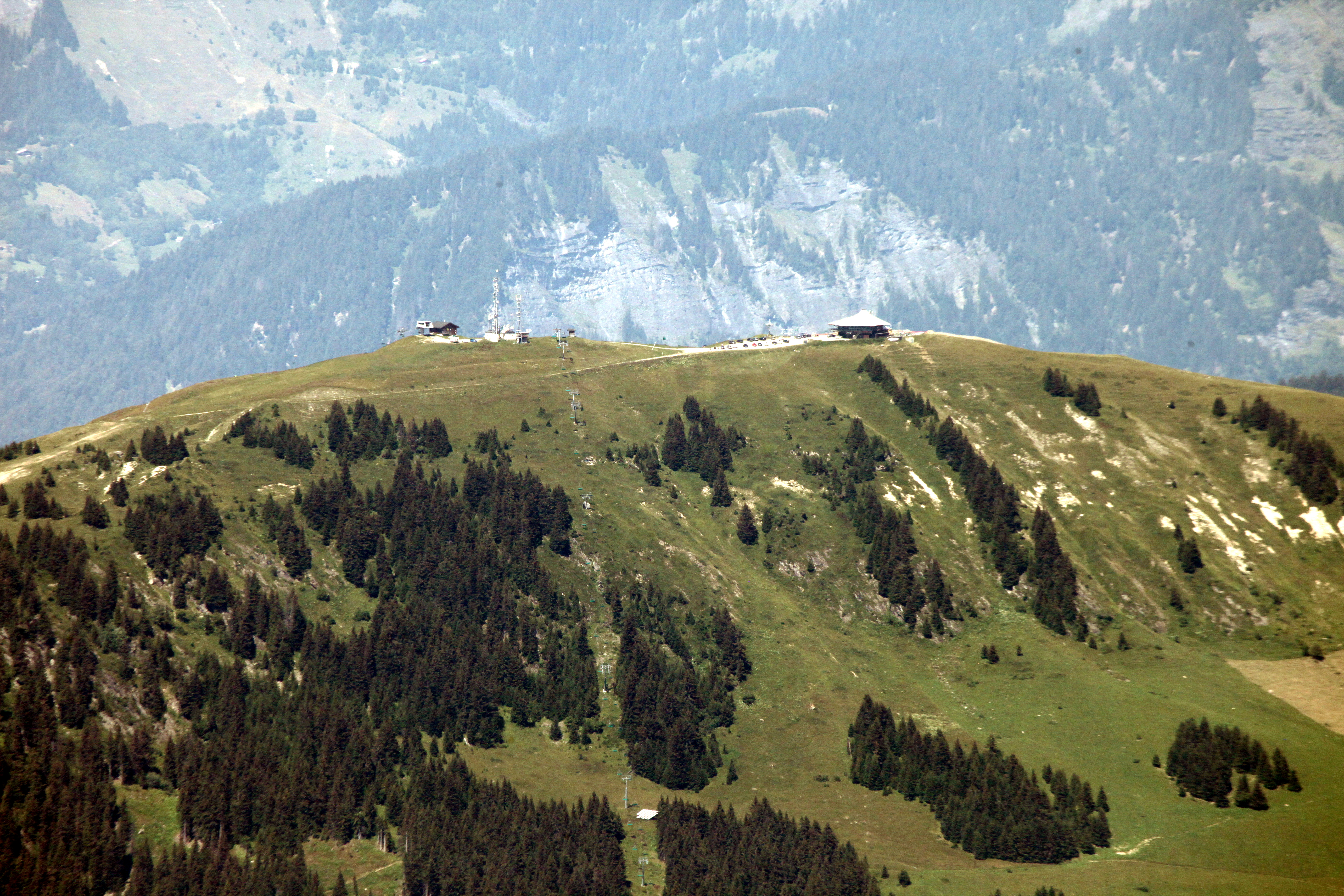 Le mont Bisanne vu du mont Mirantin.